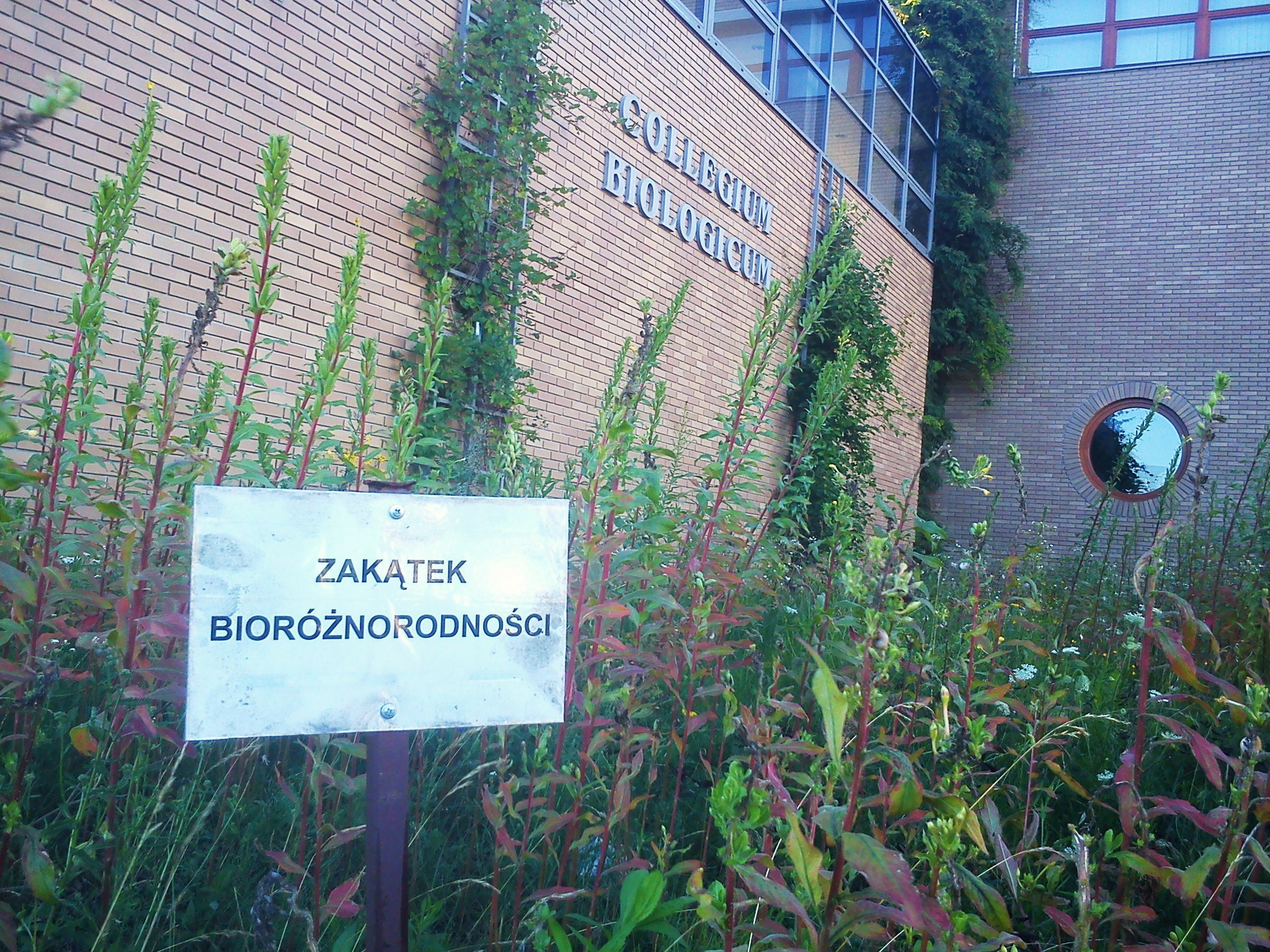 Zakątek bioróżnorodności, Collegium Biologicum, Campus Morasko, UAM Poznań.